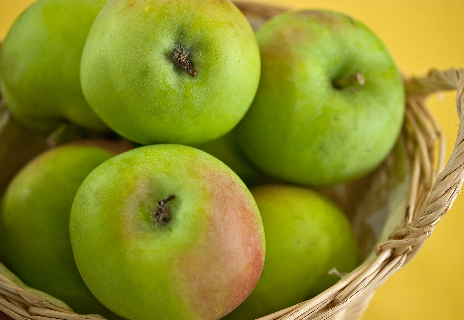 Der Bolero ist eine Apfelsorte